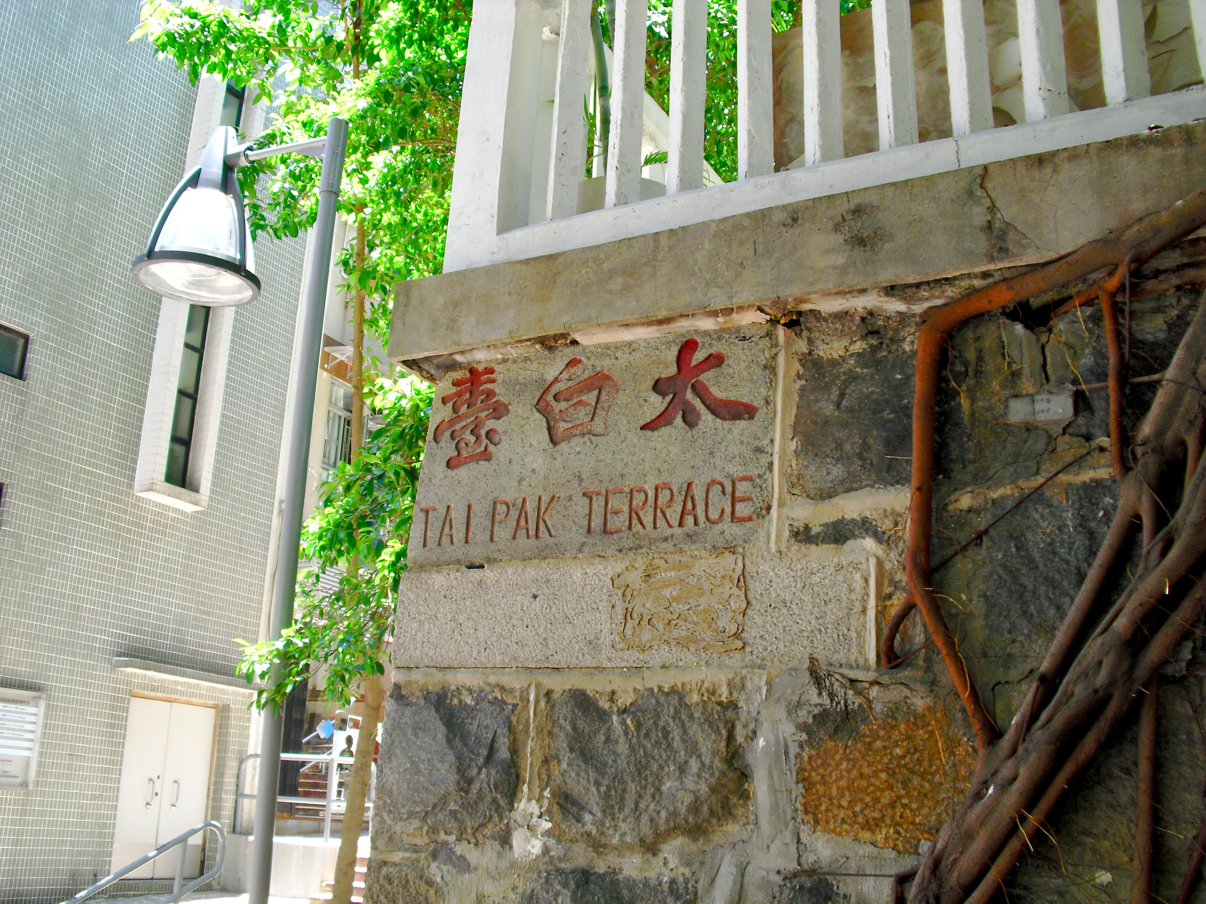 太白臺的石碑